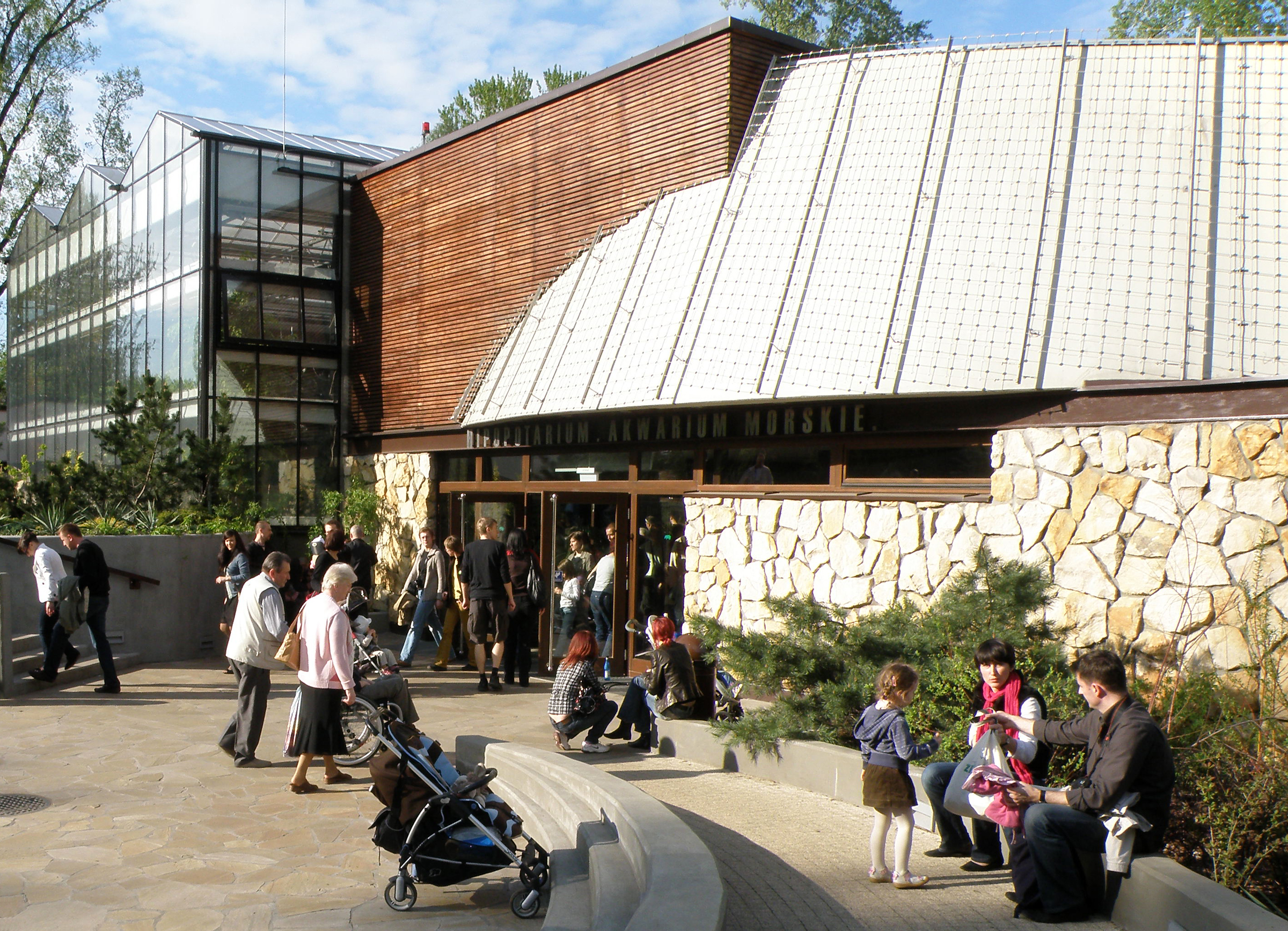 Warszawski Ogród Zoologiczny - Hipopotarium, Akwarium Morskie